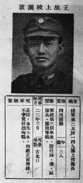 中文（台灣）: 抗戰軍人忠烈錄第一輯中的烈士遺像